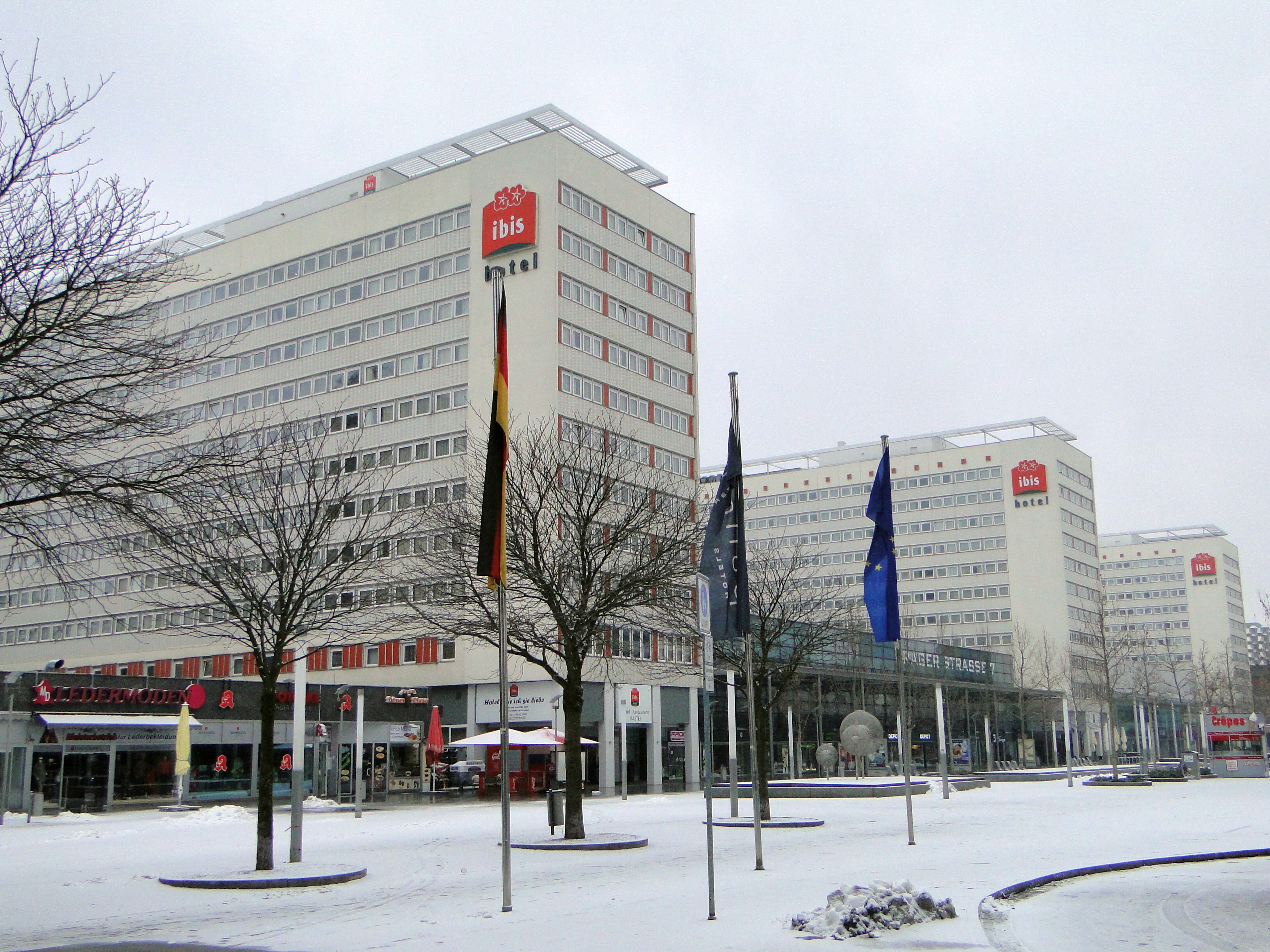 April, April, er weiß nicht, was er will... 01.04.2013 Dresden, Prager Straße